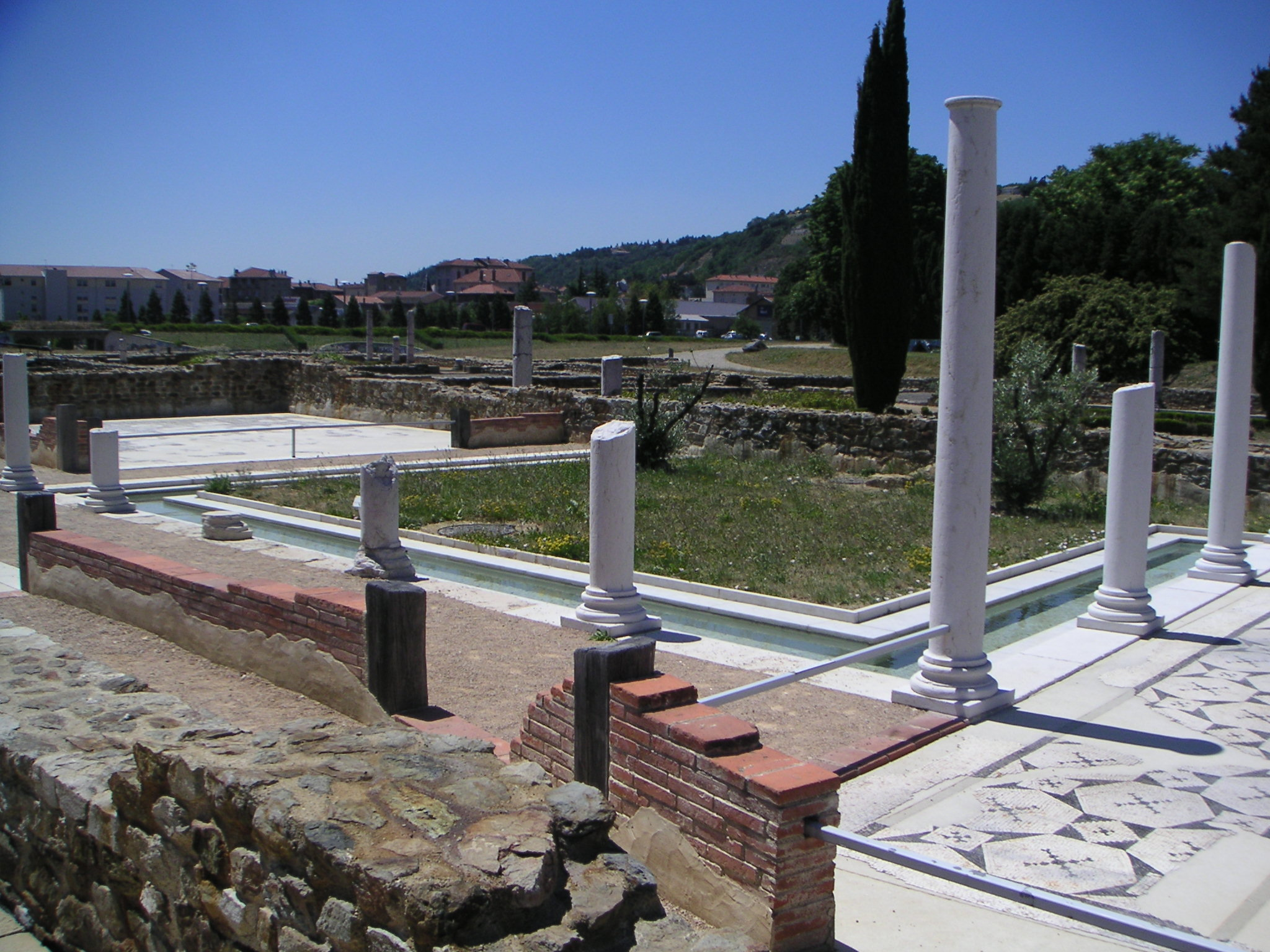 Roman remains in Vienne